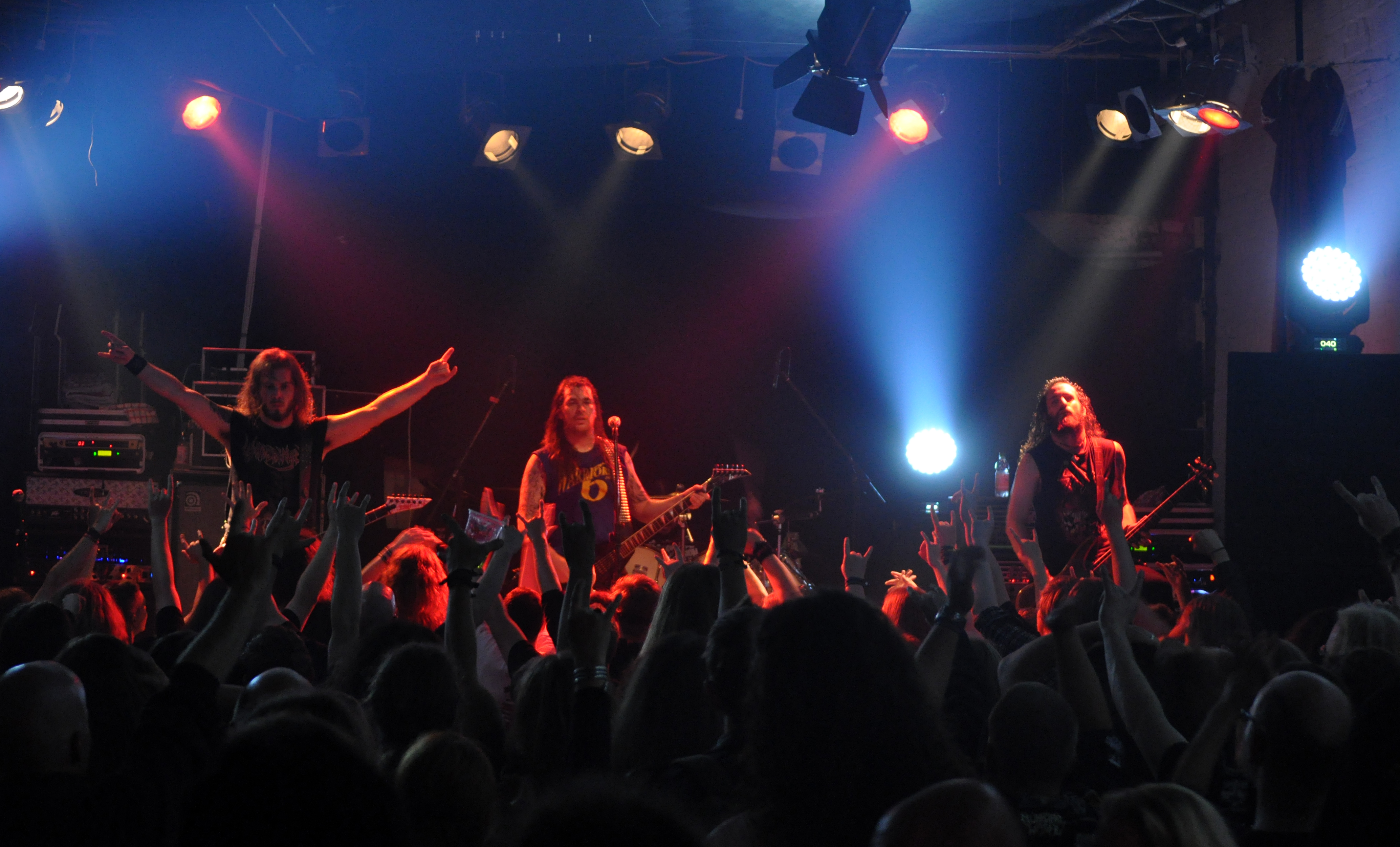 Suicidal Angels in Rostock, Germany, 2012